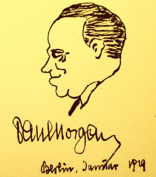 Paul Morgan Karikatur 1929